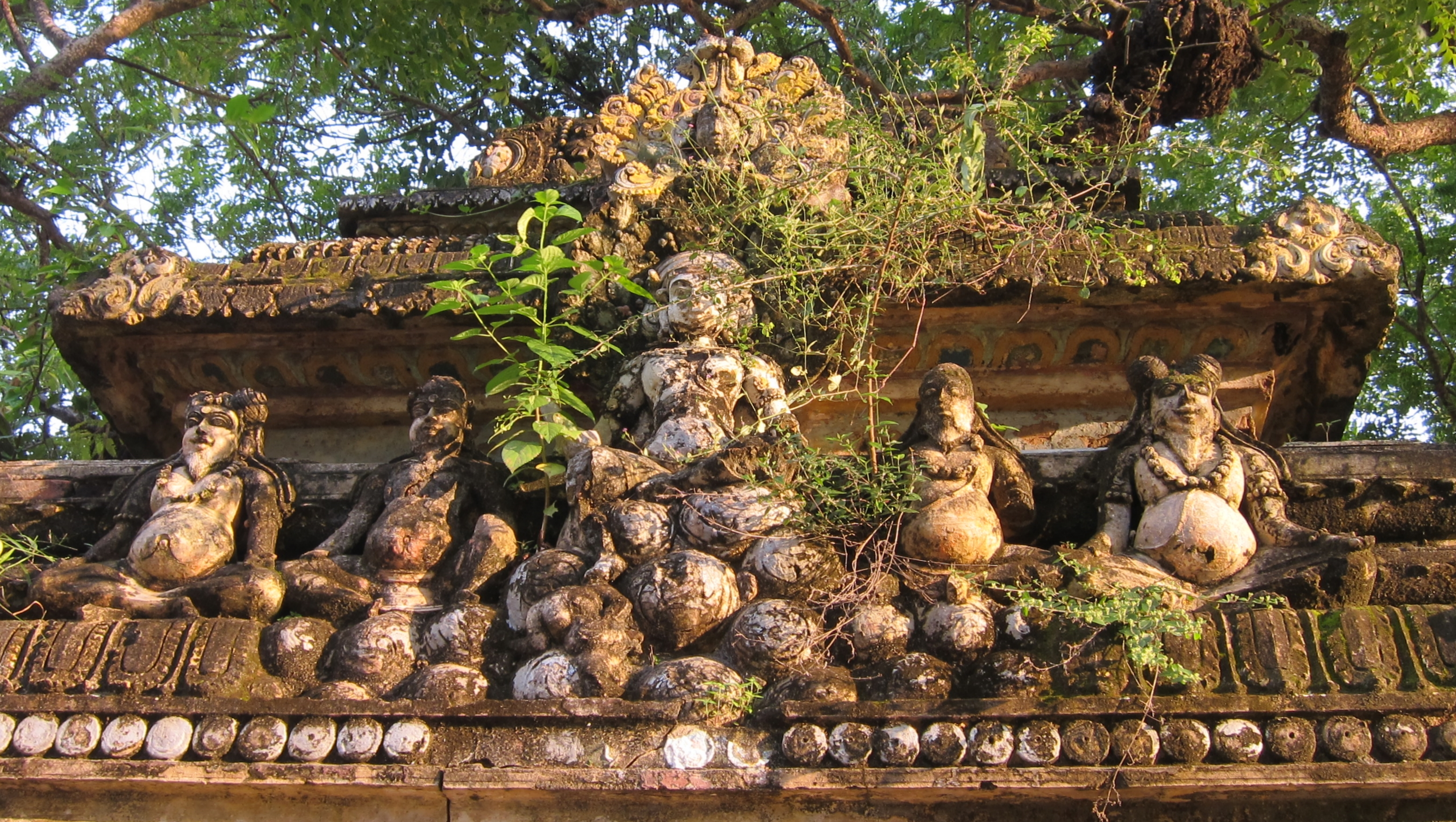 Nagulaeswaram temple Gopuram in Jaffna, Sri Lanka